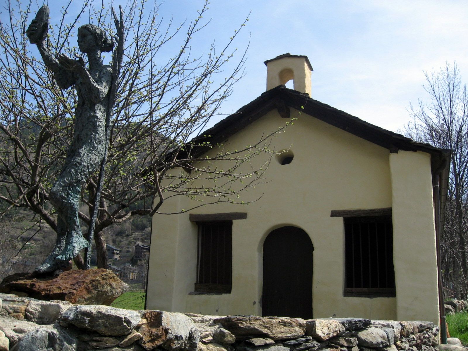 Església de Santa Barbara d'Ordino